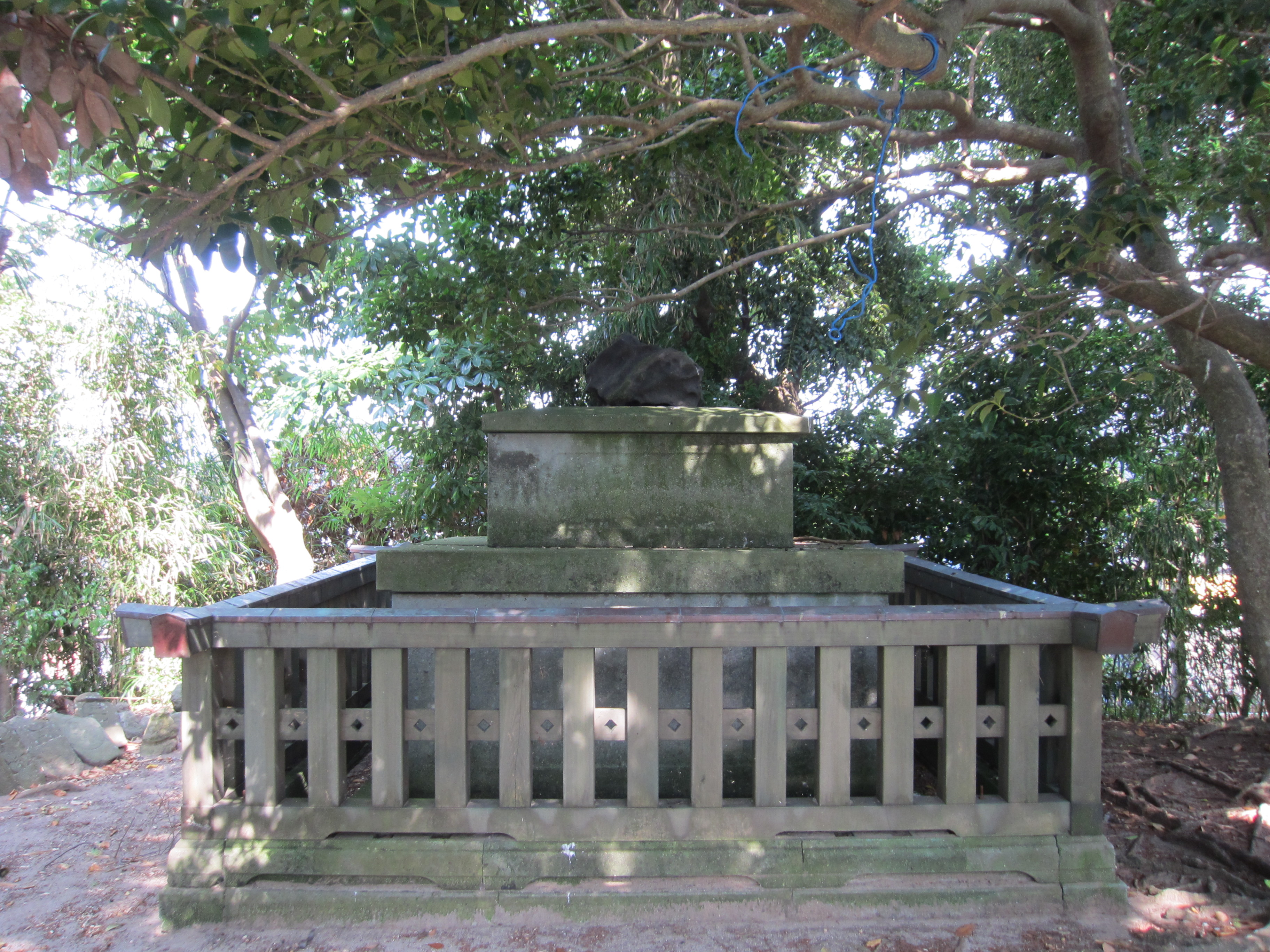 宝塚 (羽咋七塚)